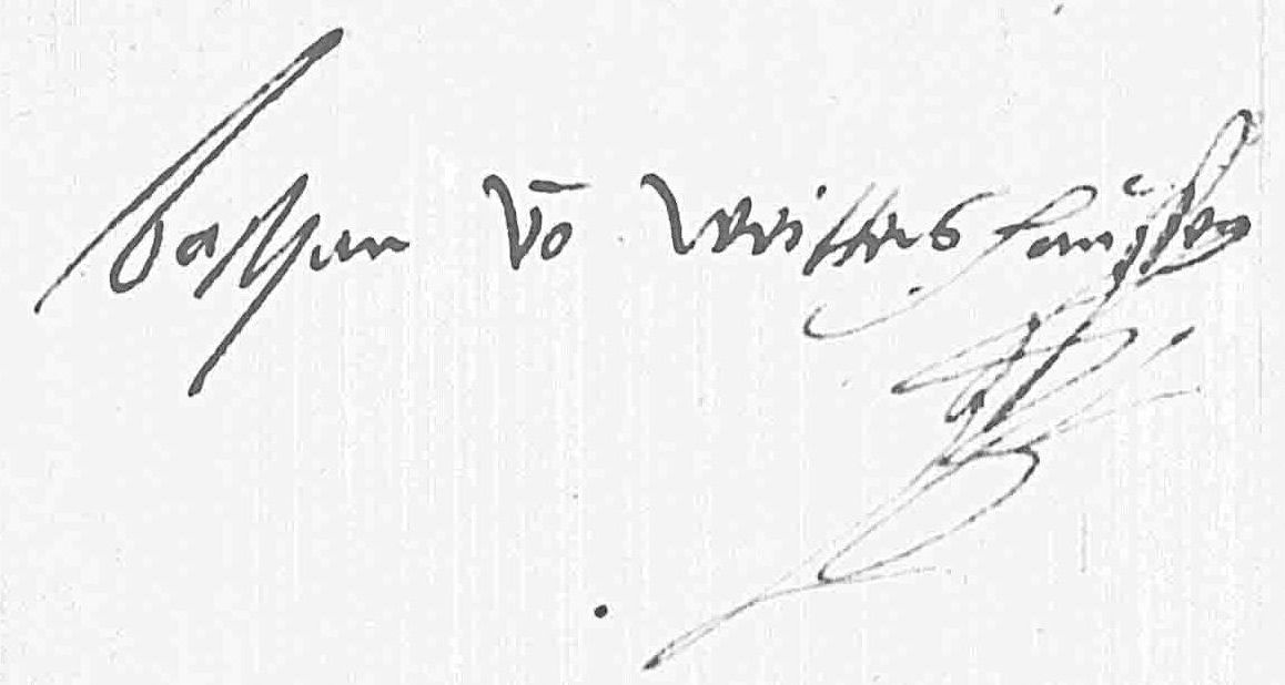 Unterschrift des Bastian von Weitterßhausen (Weitershausen, Wittershausen) auf einem Brief von an Wilhelm I. von Oranien vom 1. April 1562 aus Kassel